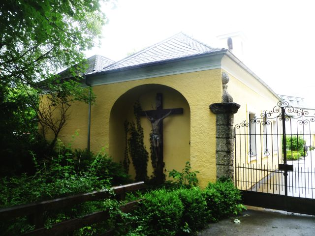 Kapelle für den hl. Joseph (Salzburg)